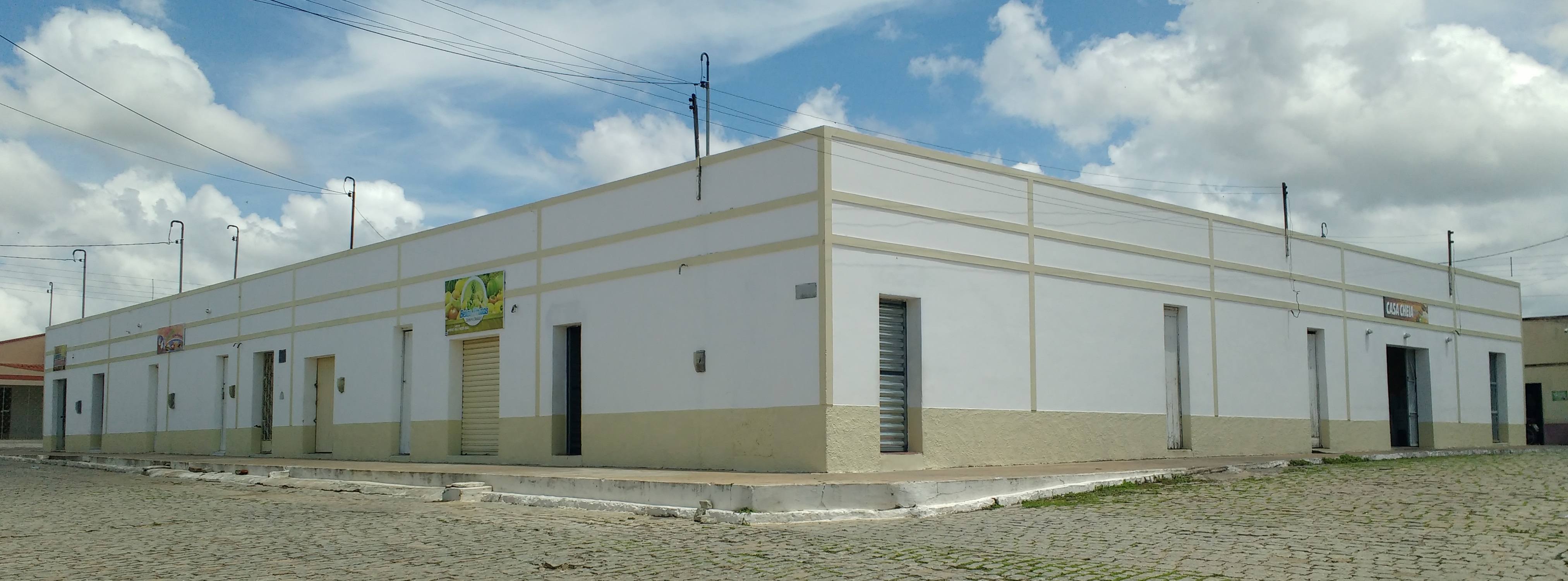 Mercado público de São Francisco do Oeste, Rio Grande do Norte (Brasil).